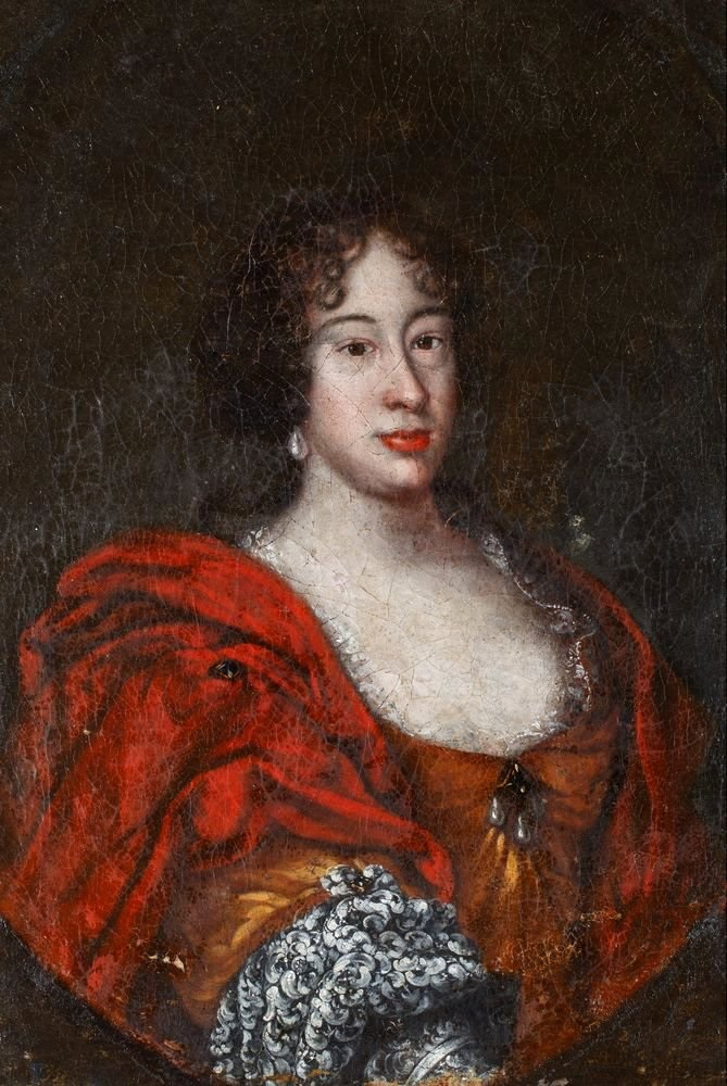 Polidora Aurora Ogińska z domu Wrangel (ok. 1670-1708)